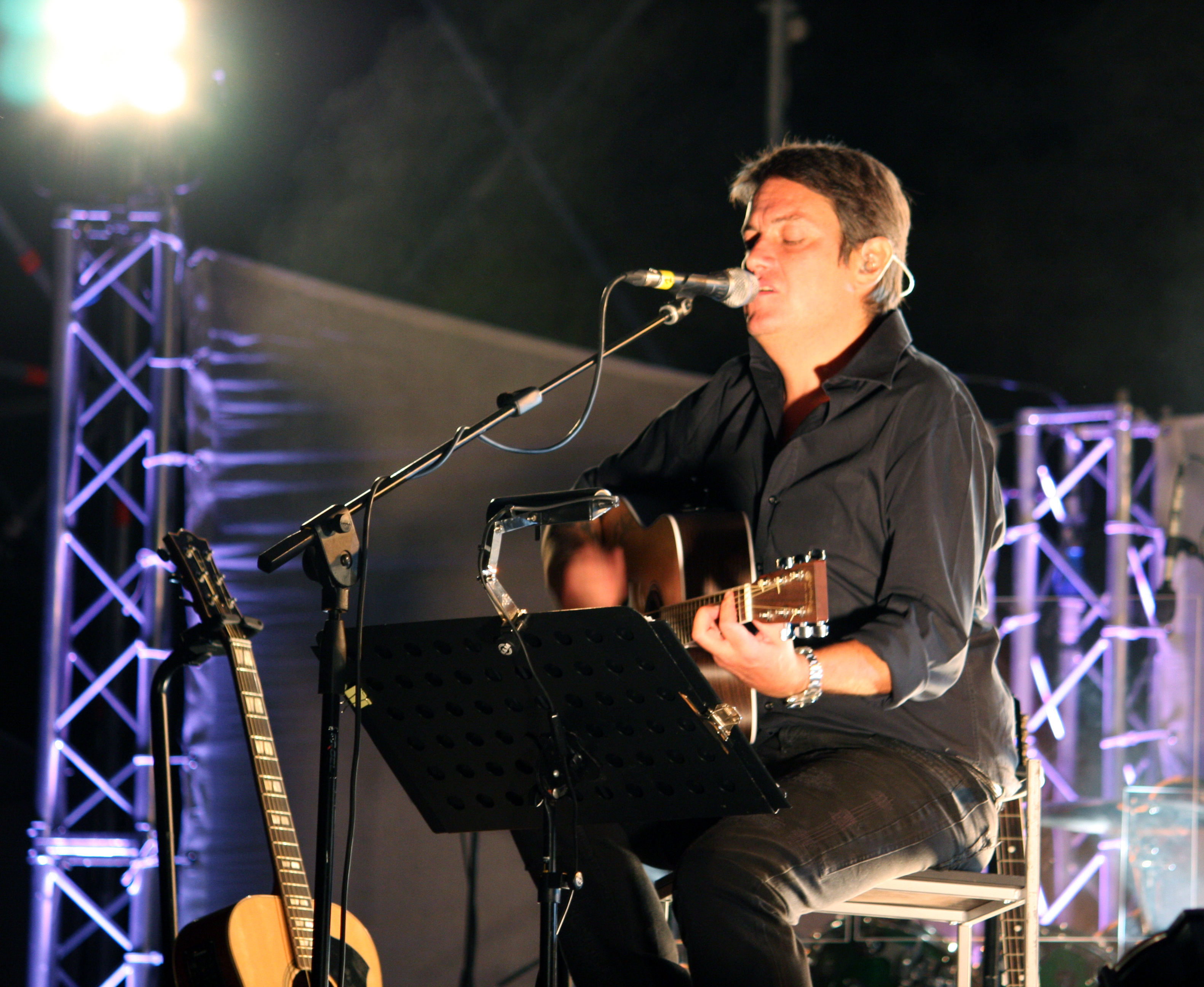 Cristiano De André alla FestUnità di Bologna.